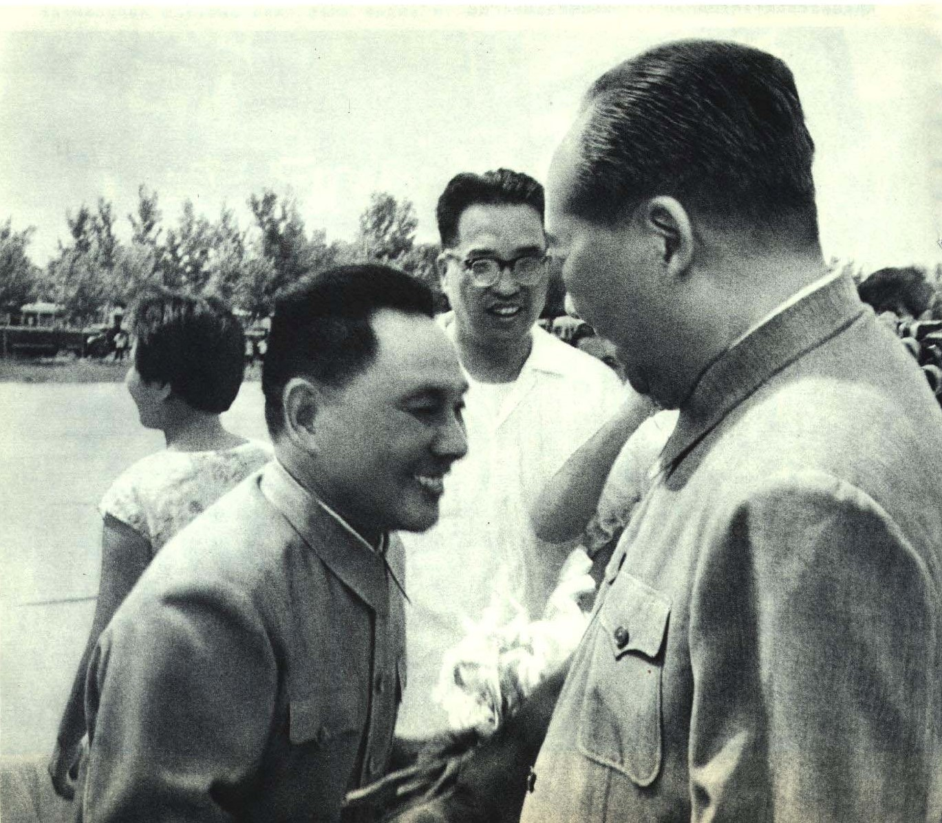 1963-09 1963年7月 邓小平率领中共代表团回国 毛泽东接见